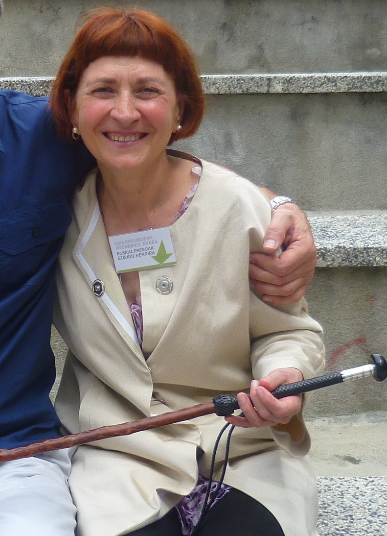 Argia Ituarte Arkotxa Ondarroako alkatea